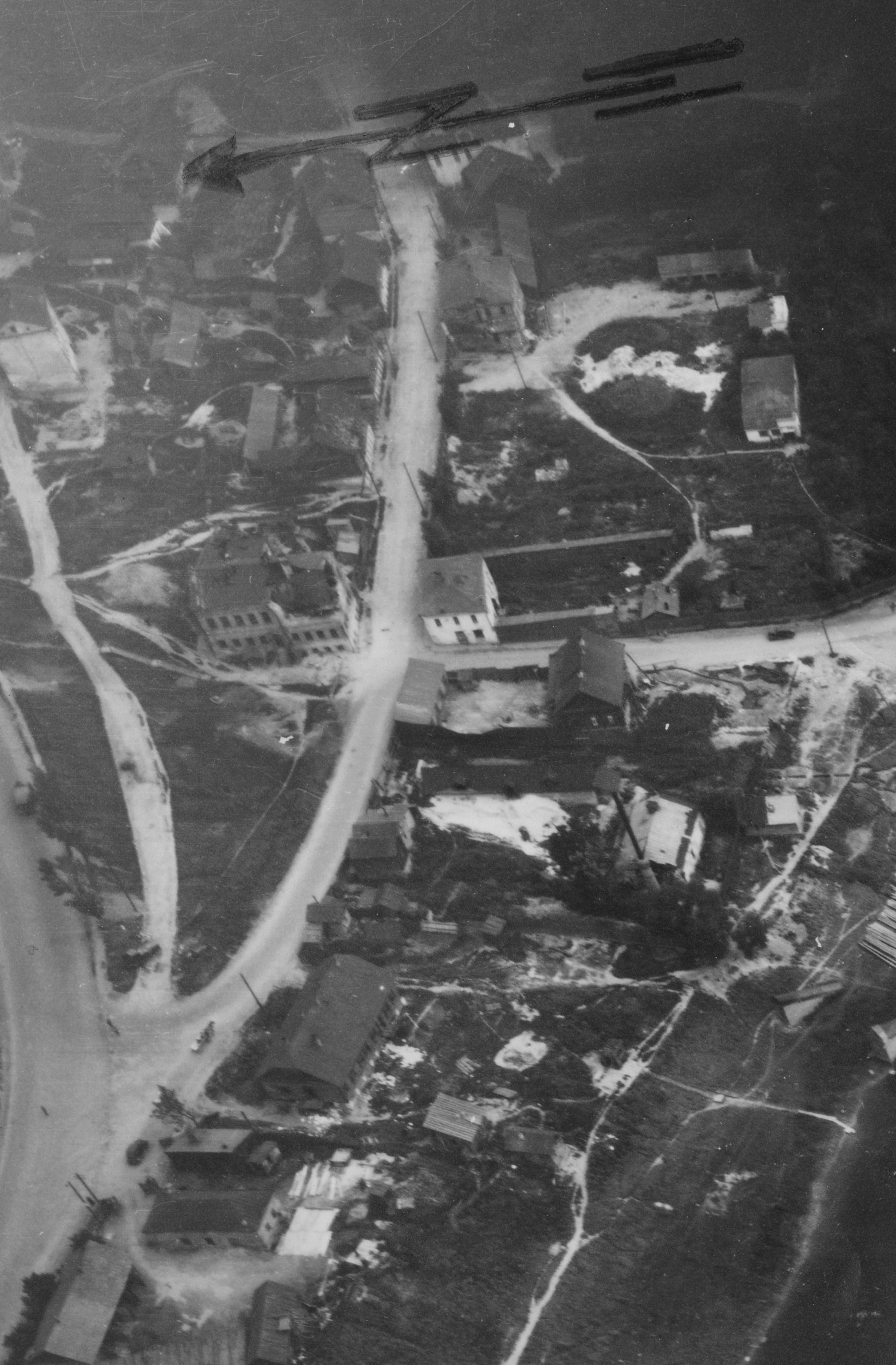 Магілёў. Нямецкі аэрафотаздымак 07-08-1941